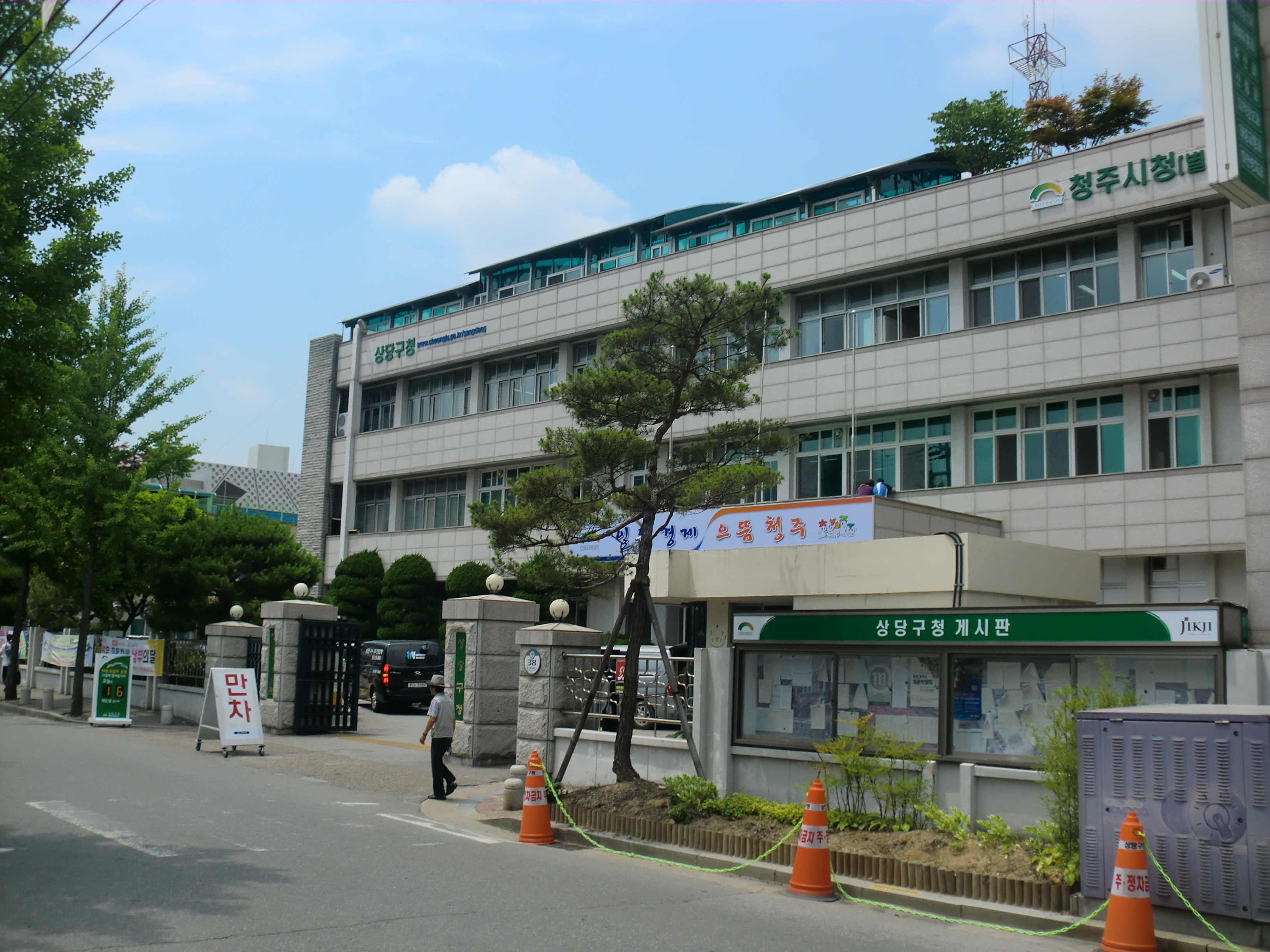 충청북도 청주시 상당구에 있는 상당구청(임시청사)